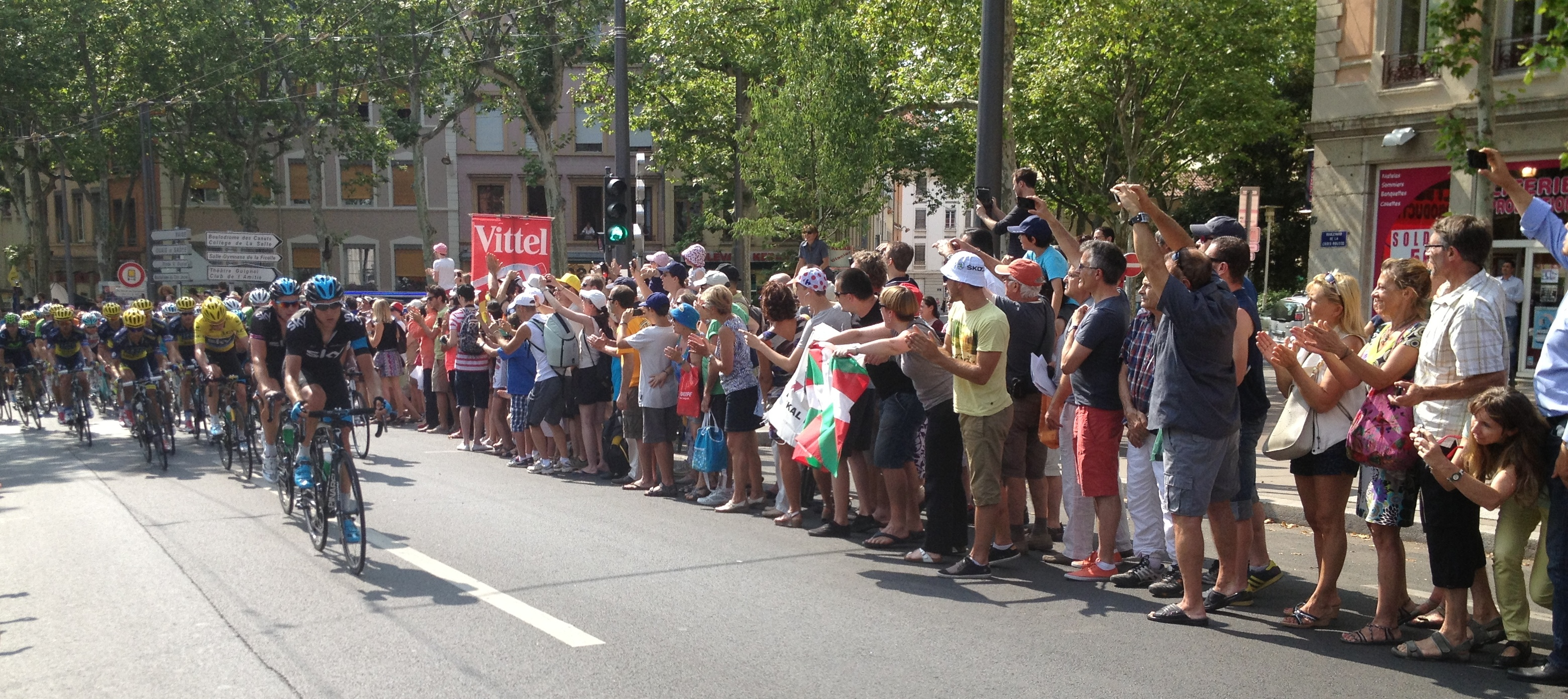 Etape 14 du Tour de France 2013.